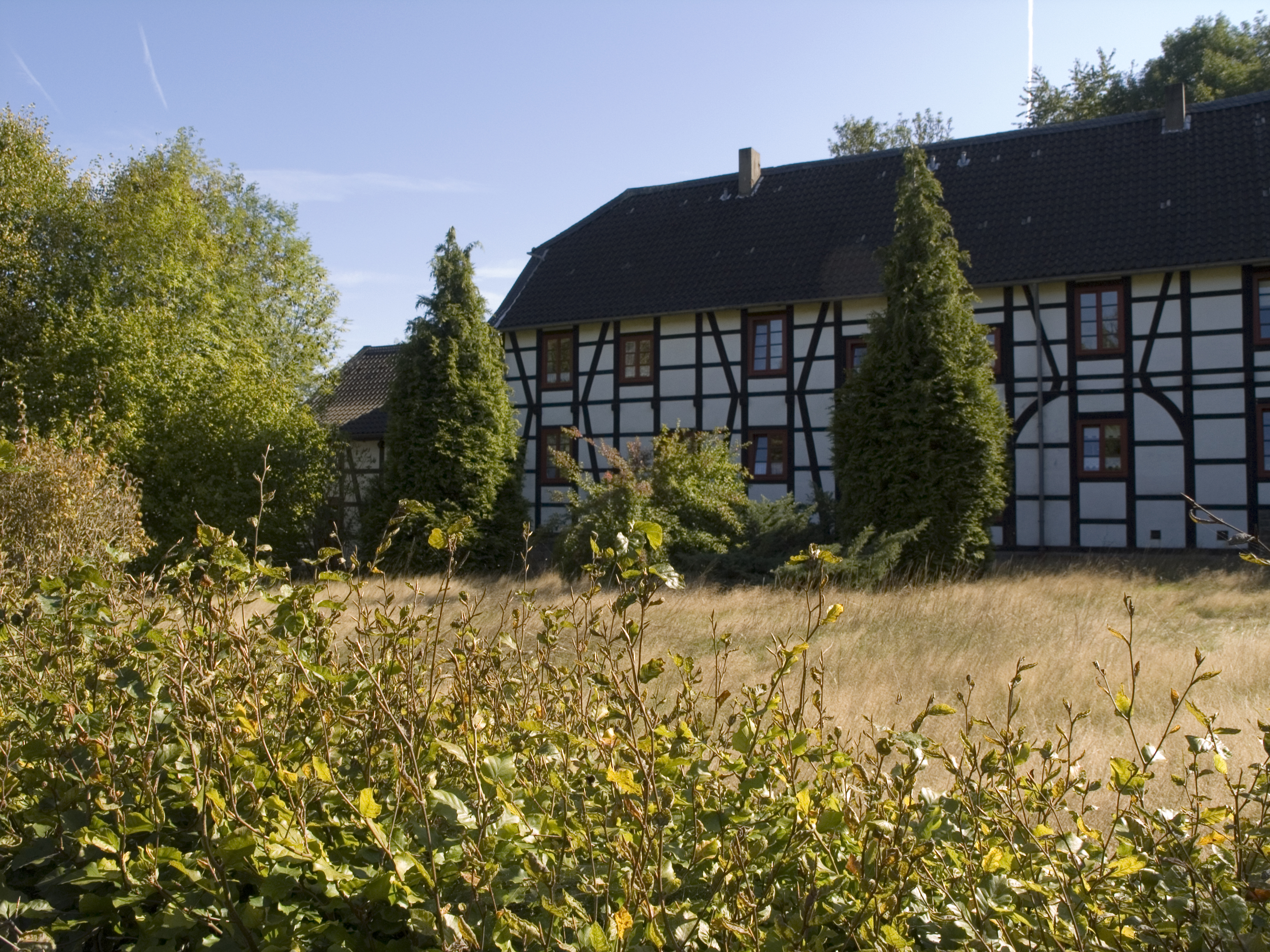 Северный Рейн - Вестфалия, Эссен - усадьба Хайзинген